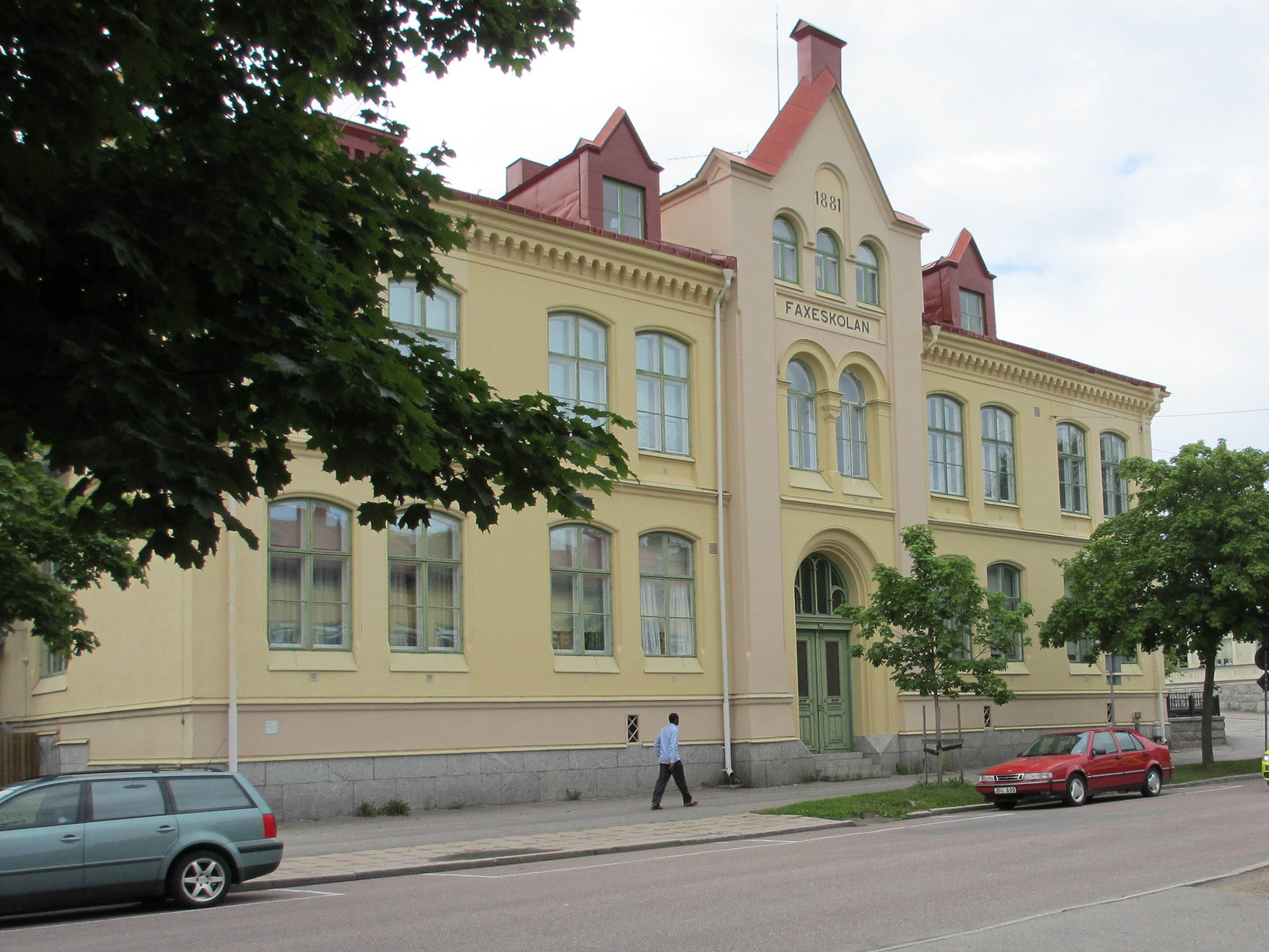 Faxeskolan i Söderhamn